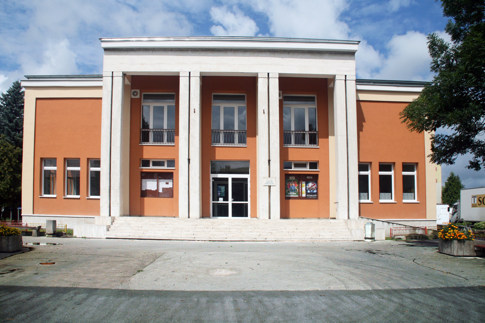 Dom kultúry vo Svidníku